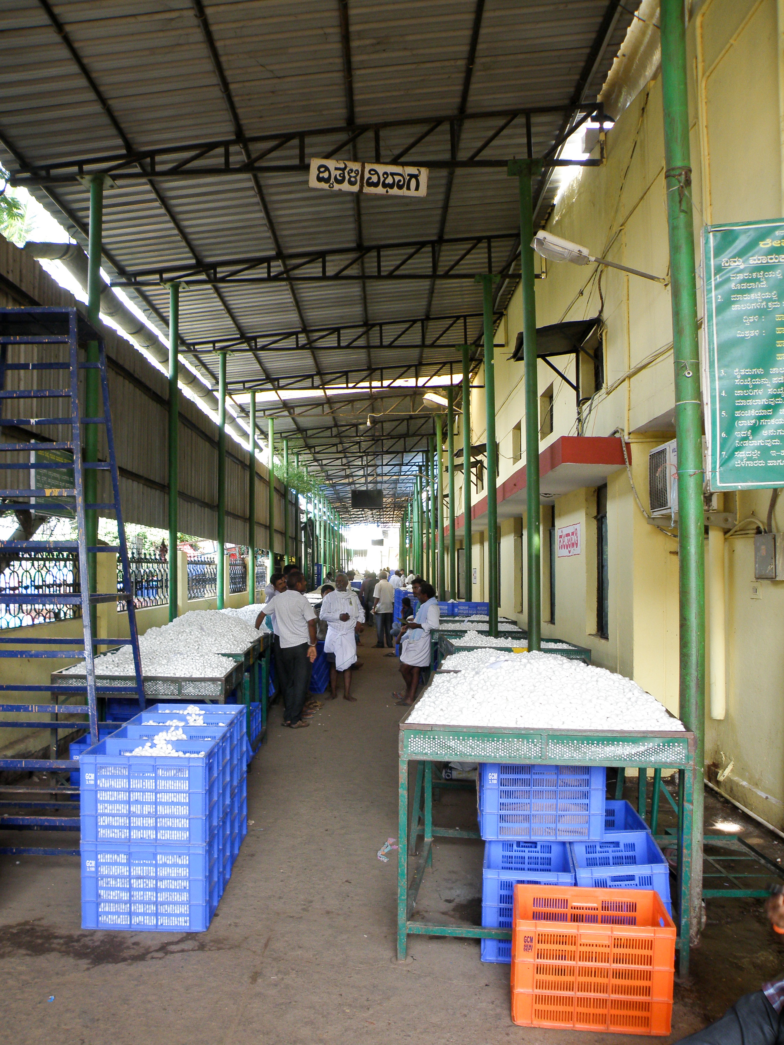 Marché aux cocons de soie à Ramanagar - Karnataka - Inde